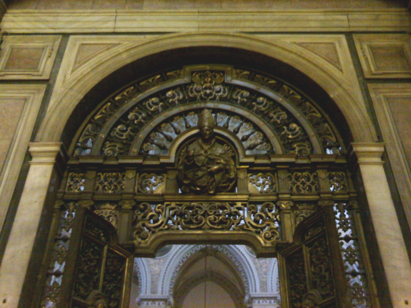 Cancello di Cosimo Fanzago - Cappella del tesoro di San Gennaro (duomo di Napoli)